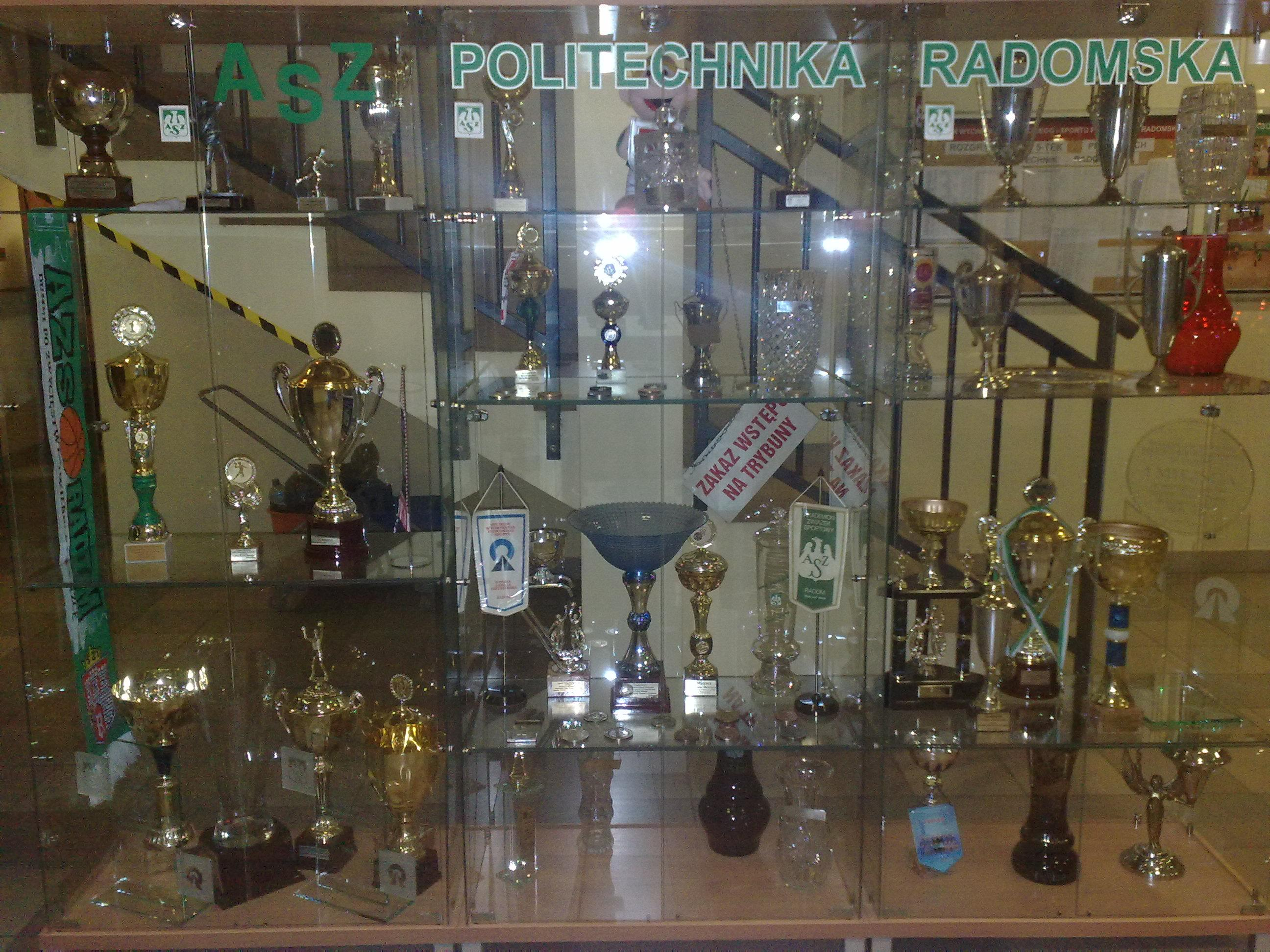 Puchary, pamiętki AZS Politechnika Radomska